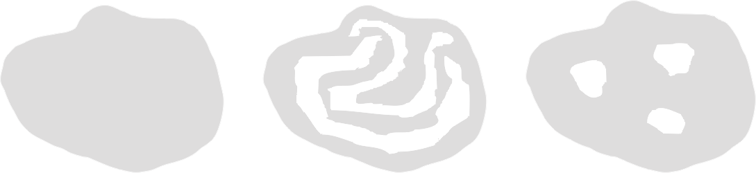 Obszar jednospójny i obszary wielospójne